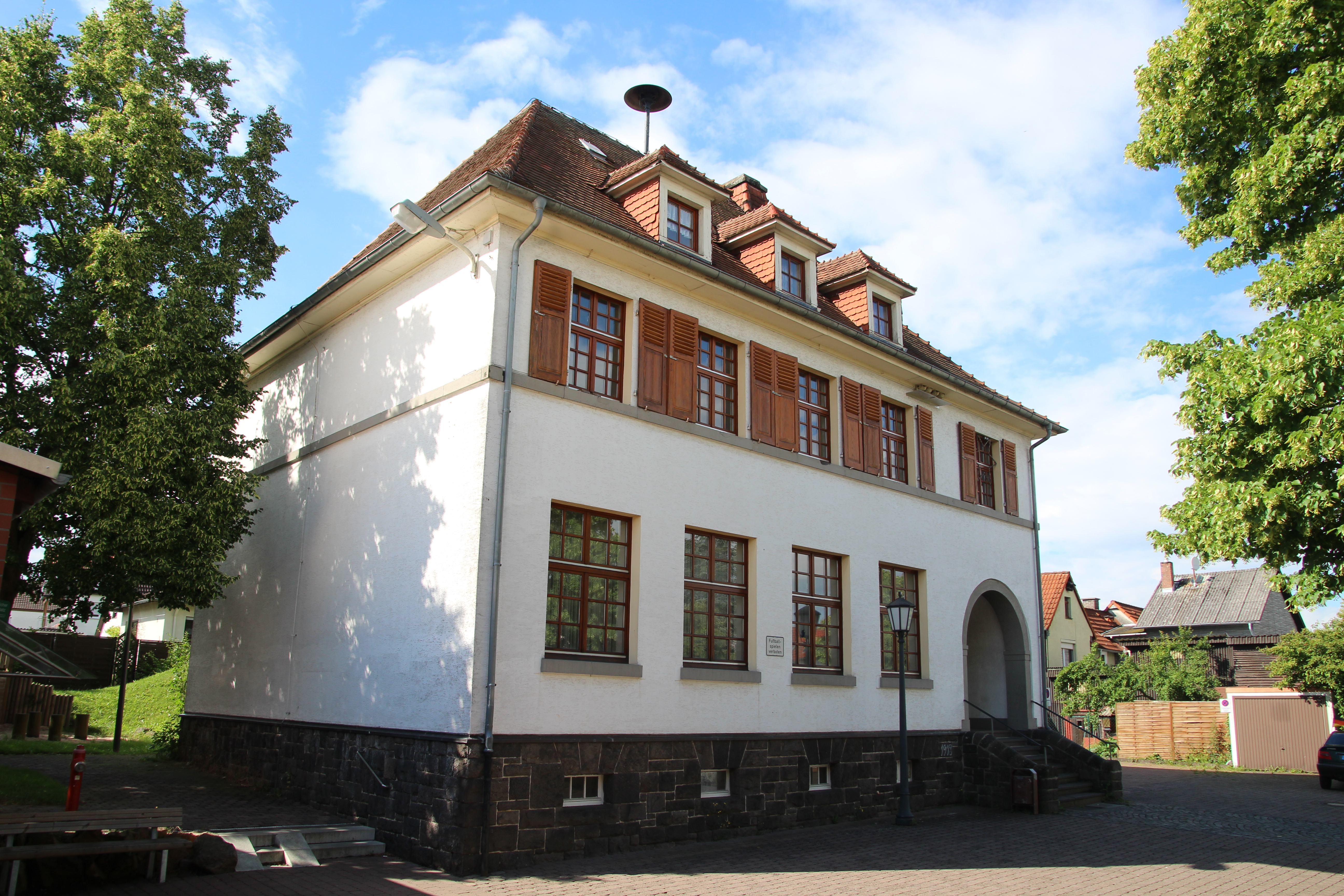 Alte Schule - Wißmarer Str. 1